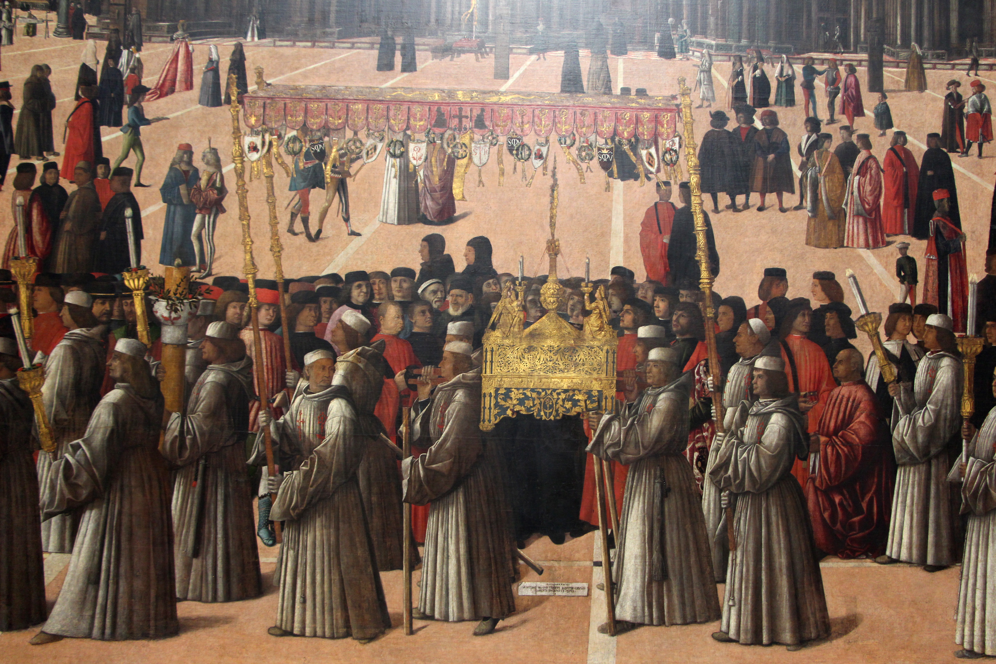 Gallerie dell'Accademia - MIBAC The making of this document was supported by Wikimedia CH. (Submit your project!) For all the files concerned, please see the category Supported by Wikimedia CH. This is a photo of a monument which is part of cultural heritage of Italy.